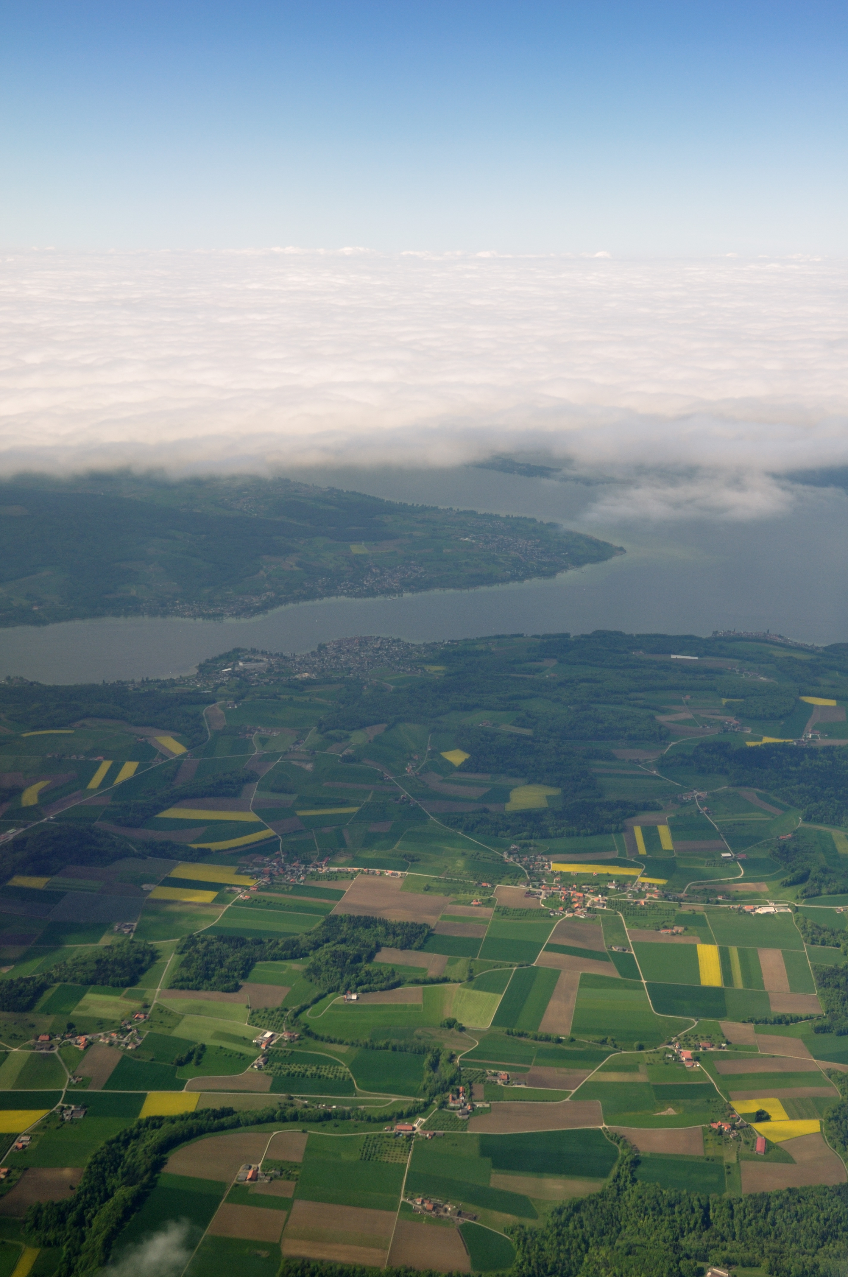 Switzerland, Thurgau, aerial view overhead Müllheim